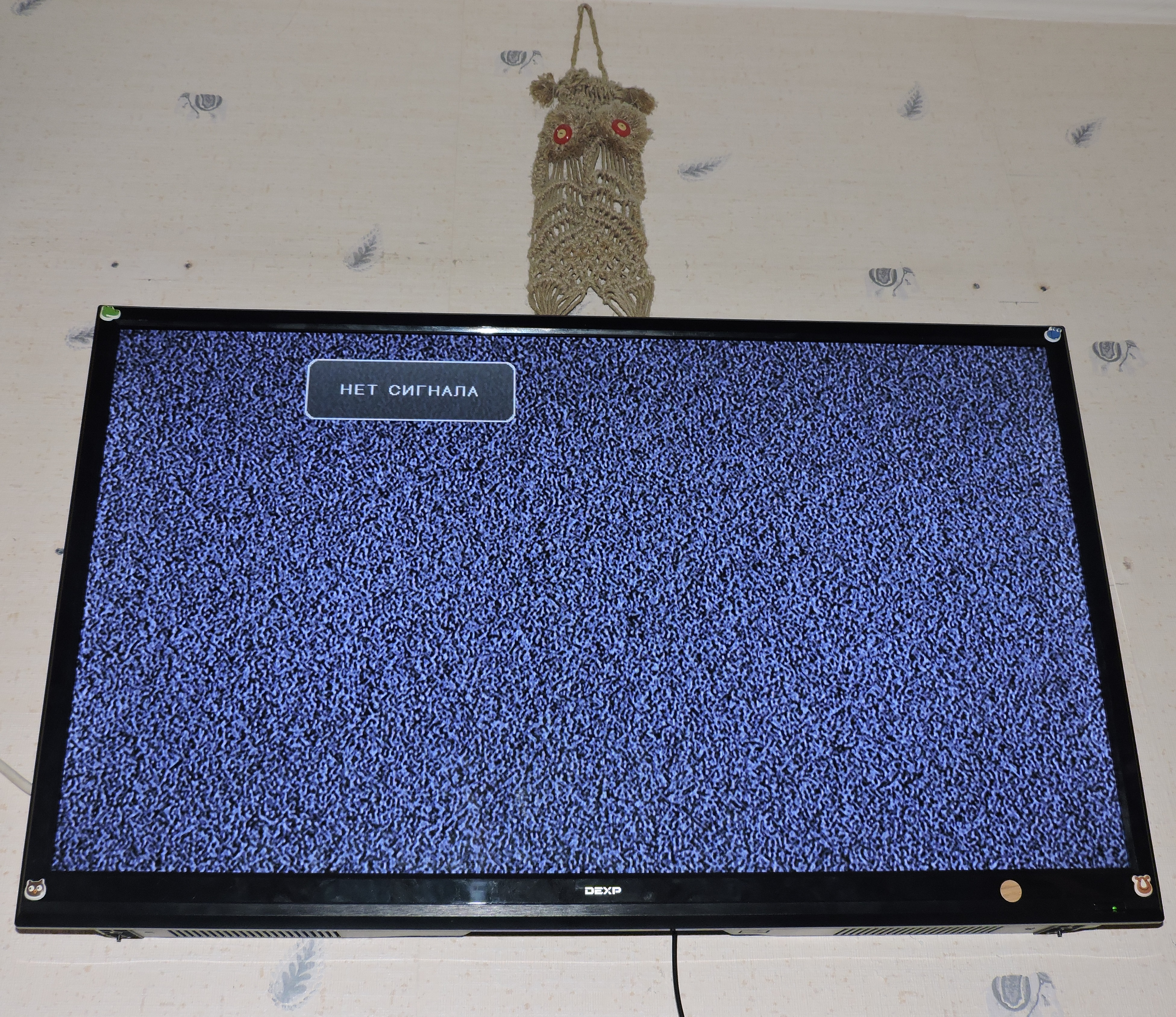 Плоский телек на стене